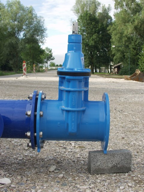 Absperrschieber DIN 200 für Wasserleitung